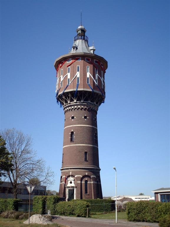 Watertoren in Sneek.